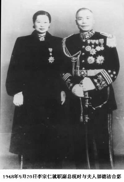 1948年5月20日李宗仁就职副总统时与夫人郭德洁合影